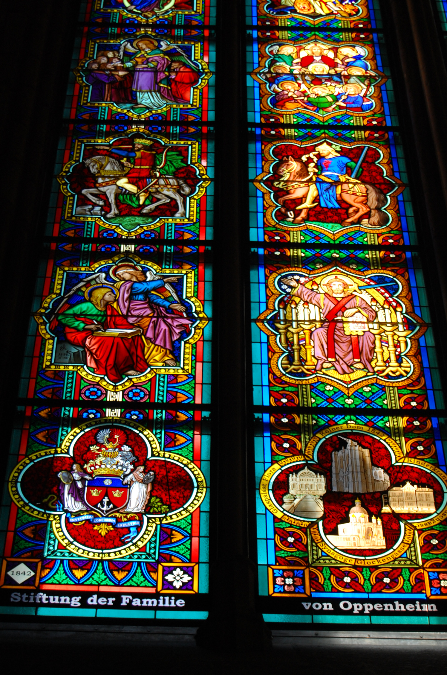 Größter Teil der linken Seite (Detail) des von der Familie Oppenheim gestifteten, von Michael Welter bemalten, Fensters im Kölner Dom, gleich rechts neben dem Eingang; links unten: Wappen derer von Oppenheim